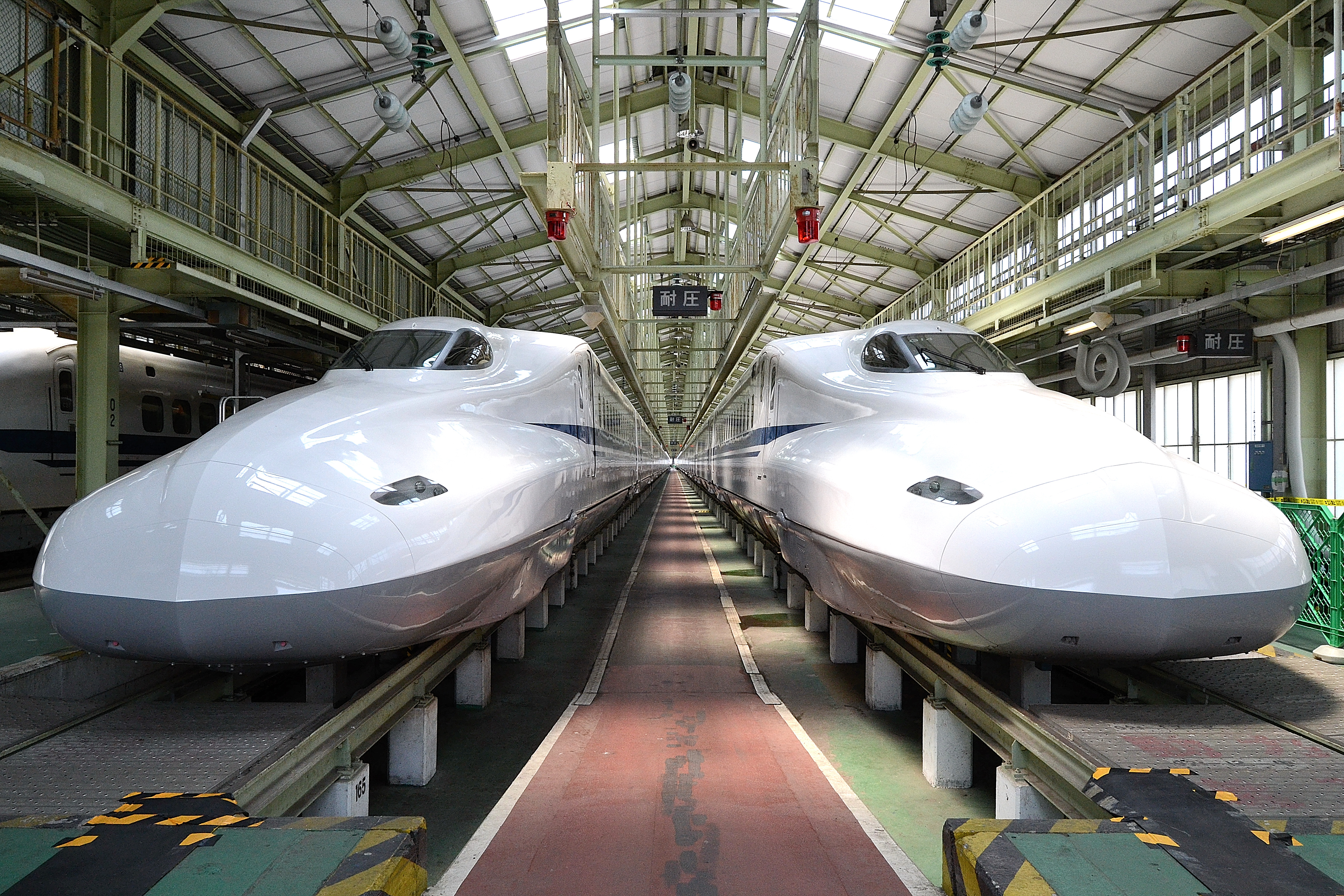 東海道新幹線の浜松工場内に留置中のN700系の2編成（2014年、浜松工場で開催された新幹線なるほど発見デーにおいて撮影）。